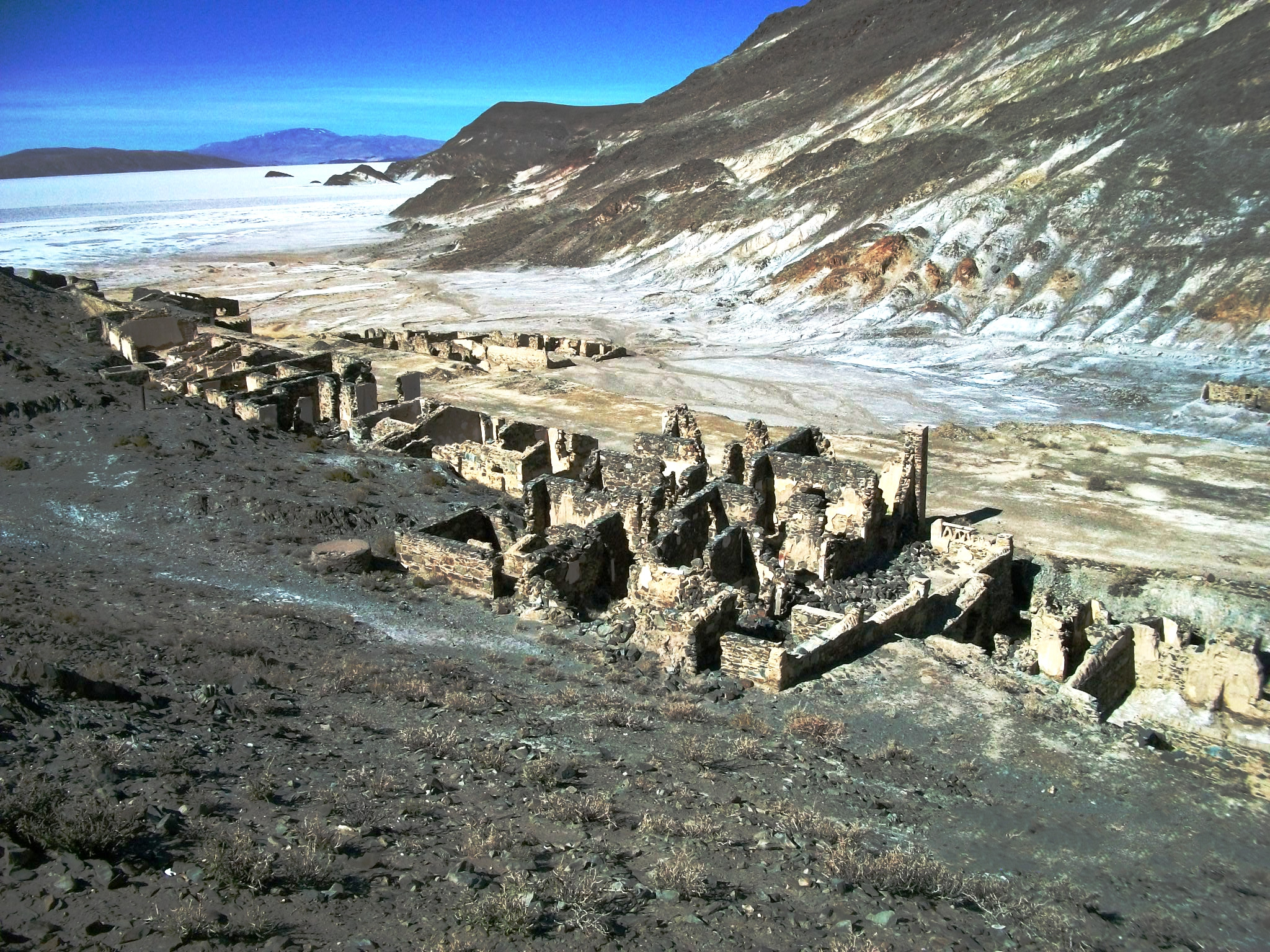 Ruinas de las minas de Incahuasi que se ubican en el extremo sudoeste del Salar del Hombre Muerto, en el noreste del departamento Antofagasta de la Sierra, provincia de Catamarca.